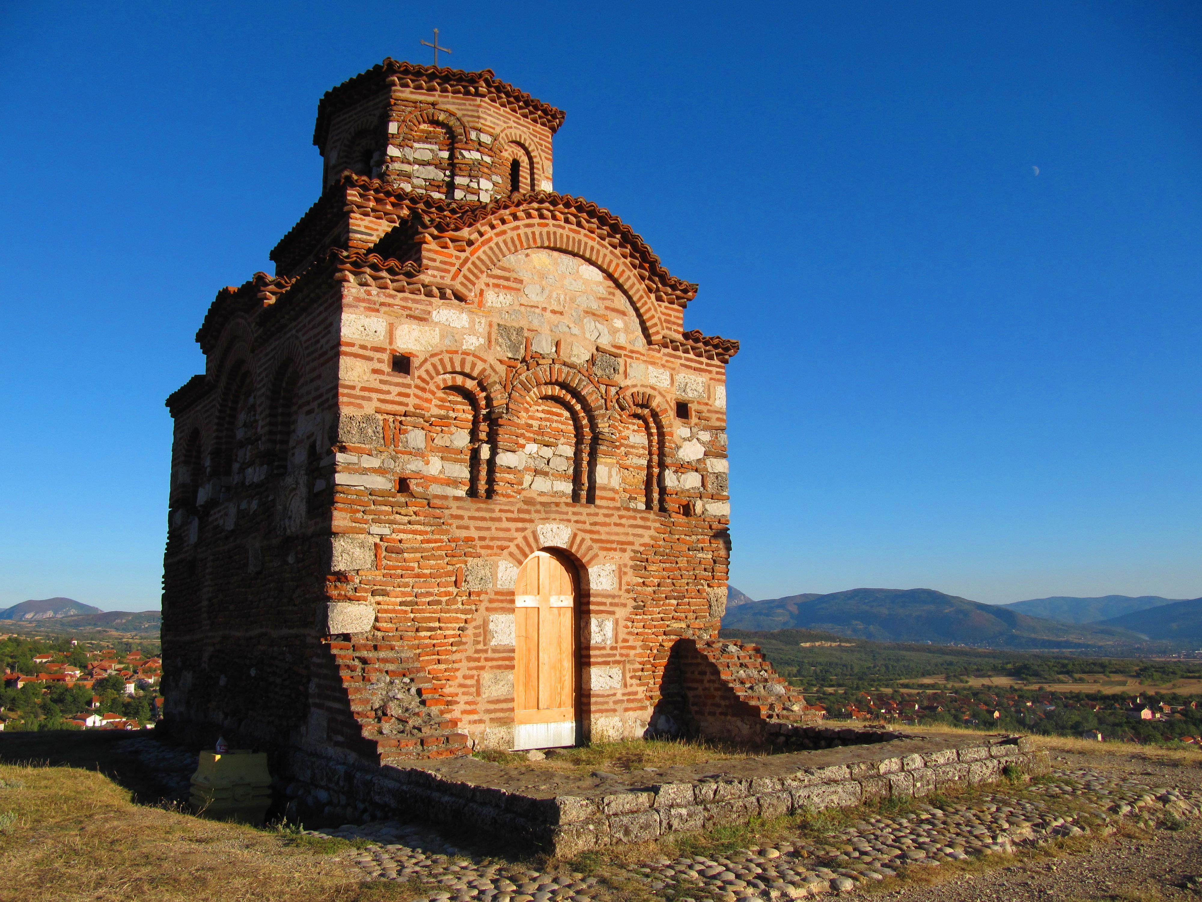 Латинска црква у селу Горњи Матејевац у близини Ниша. Ова црква је позната и под називом "Русавија", а претпоставља се да је изграђена у ХI веку. Један је од ретких очуваних објеката у Србији из тог периода.